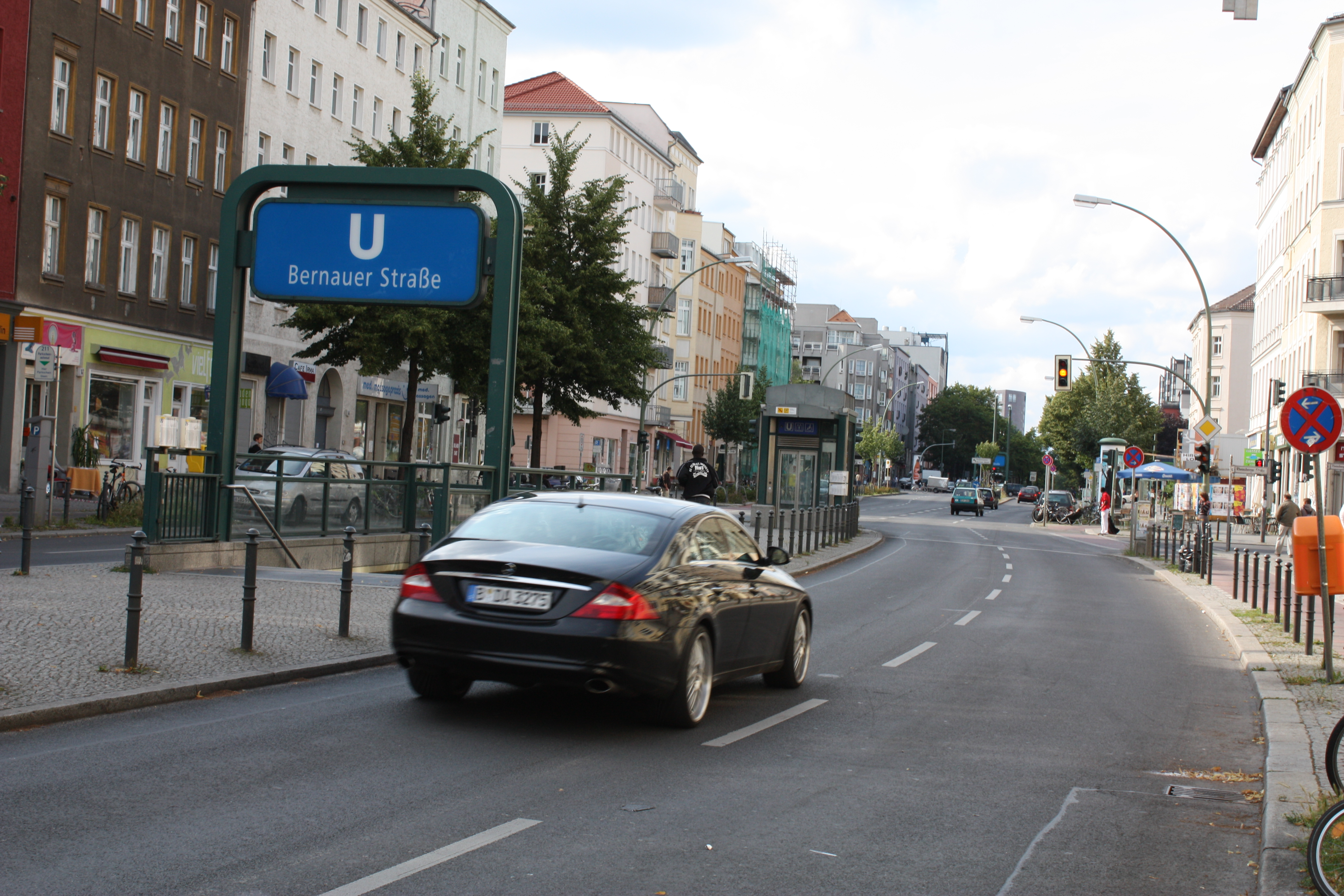 Berlin, U-Bahn